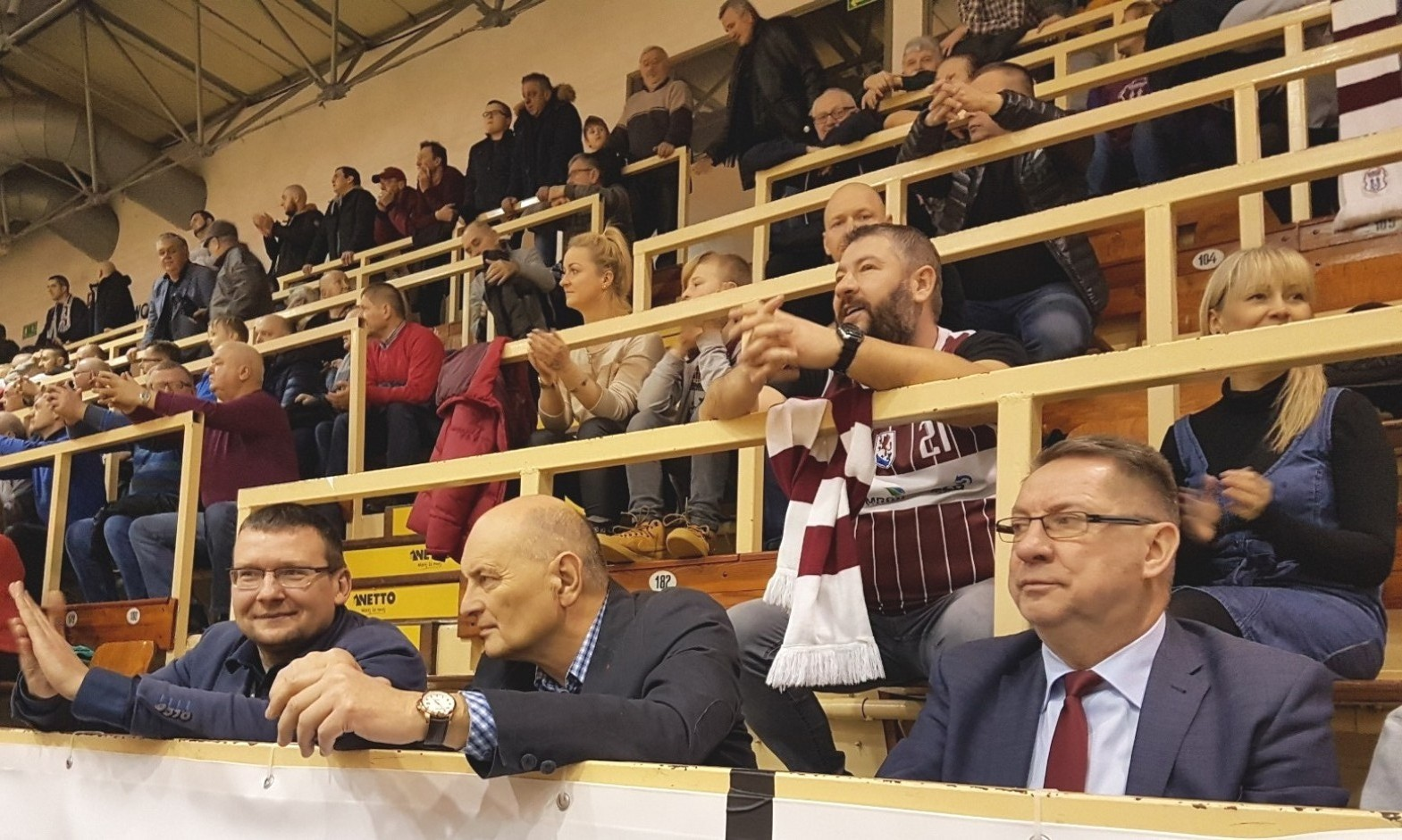 Paweł Ksiądz, Tadeusz Gutowski, , Krzysztof Koziorowicz